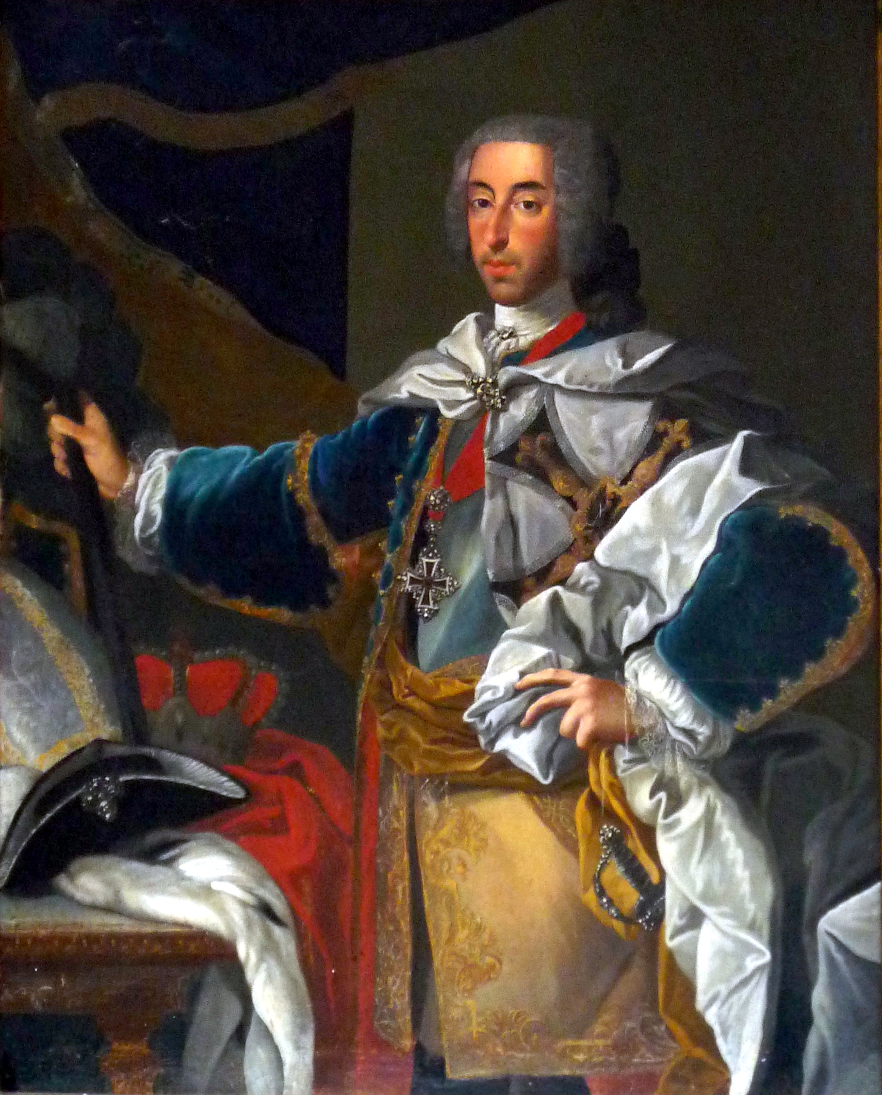 Churfürst Clemens August von Köln (1700-1761)